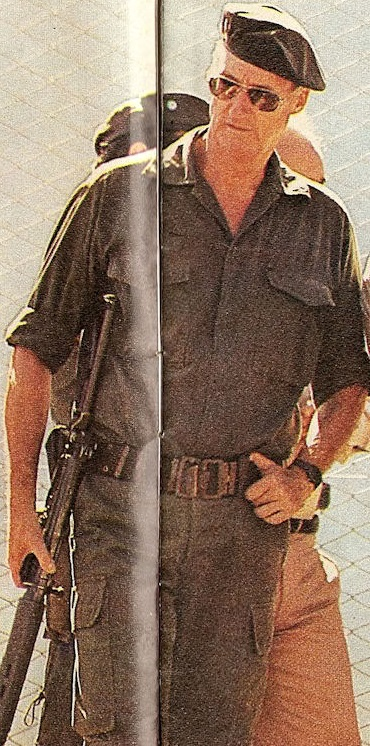 El entonces General de División Martín Balza a cargo de la represión del levantamiento de los "Carapintadas" del 3 de diciembre de 1990.